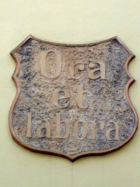 Kamienna Góra, ul. Karola Miarki 1, kartusz z dewizą "Ora et labora"